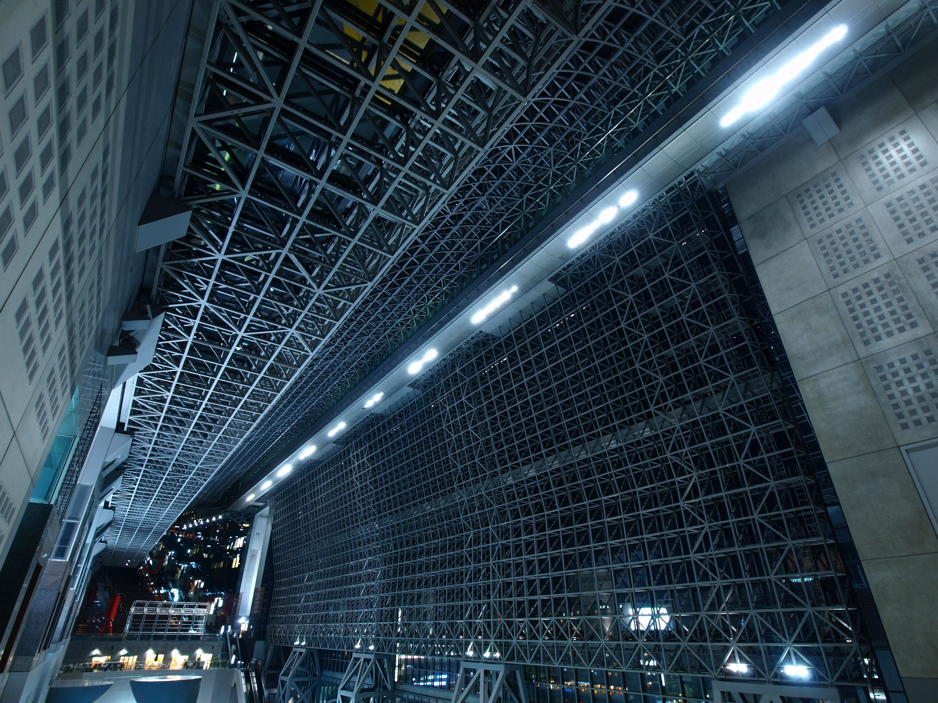 巨大空間